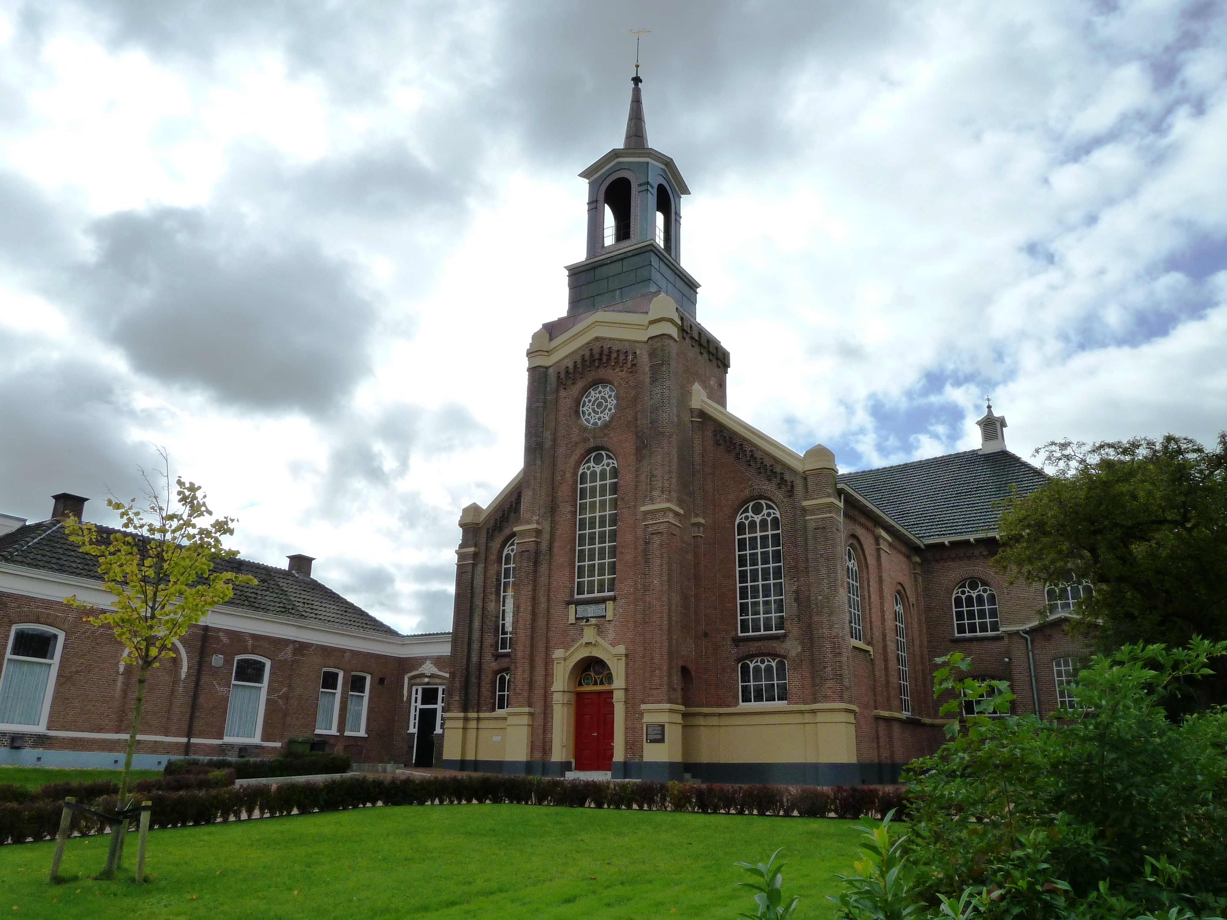 Gereformeerde kerk (1869) aan de Burchtstraat in Middelstum (Groningen, Nederland)